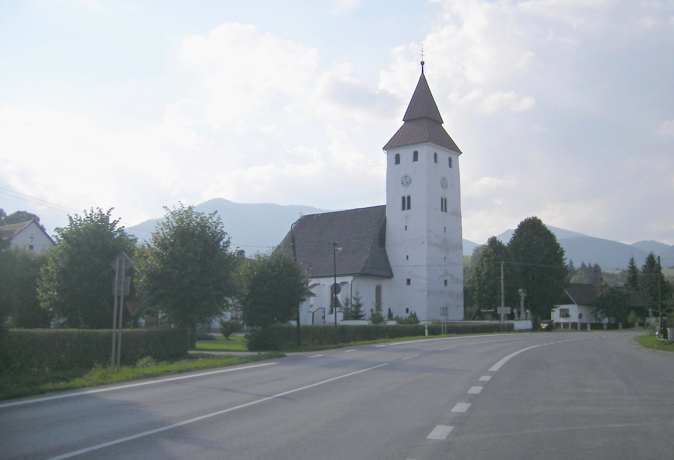 Veličná (okres Dolný Kubín)